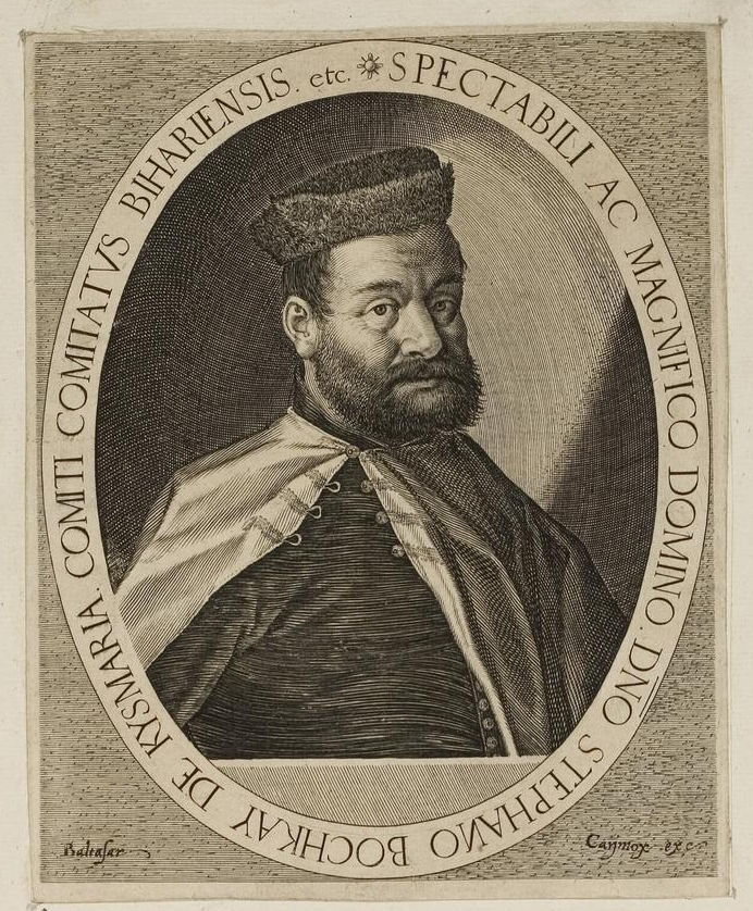 Grafik aus dem Klebeband Nr. 1 der Fürstlich Waldeckschen Hofbibliothek Arolsen Motiv: Stephan Bocskai (1557–1606), Fürst von Siebenbüegen